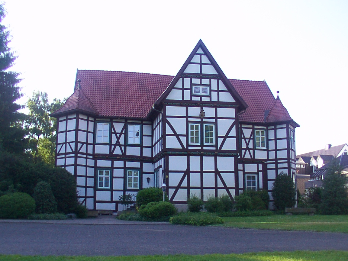 Hövelhof: ehemaliges fürstbischöfliches Jagdschloss, heute katholisches Pfarrhaus